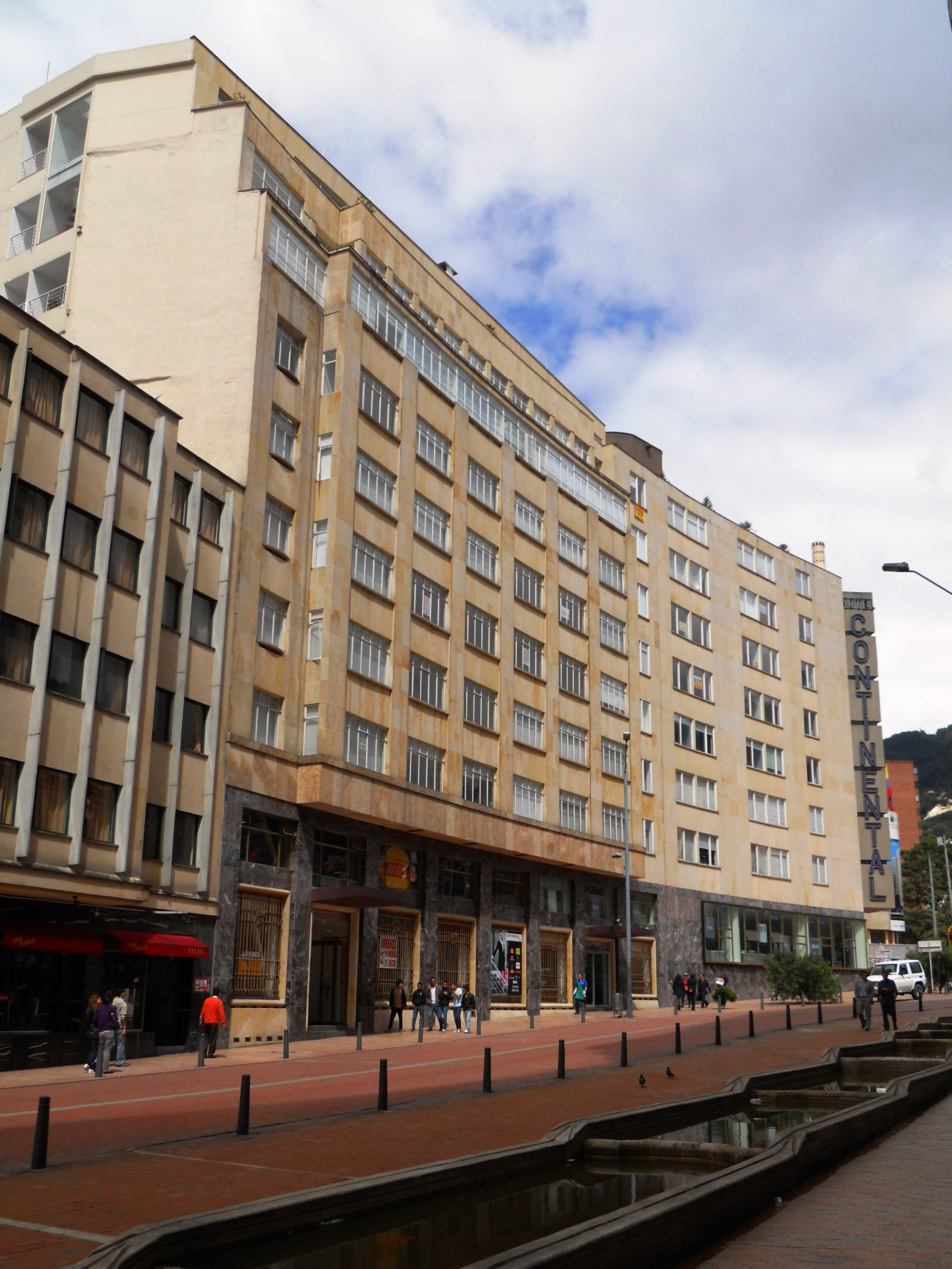 Edificio Hotel Continental en el Eje Ambiental con carrera Quinta, en Bogotá.